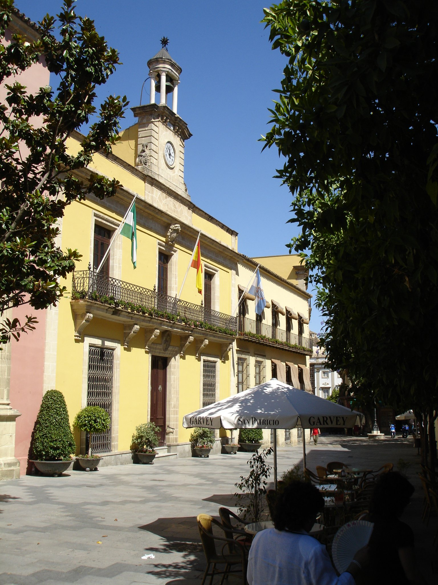 Town Hall (Ayuntamiento). Jerez de la Frontera (Andalusia, Spain)